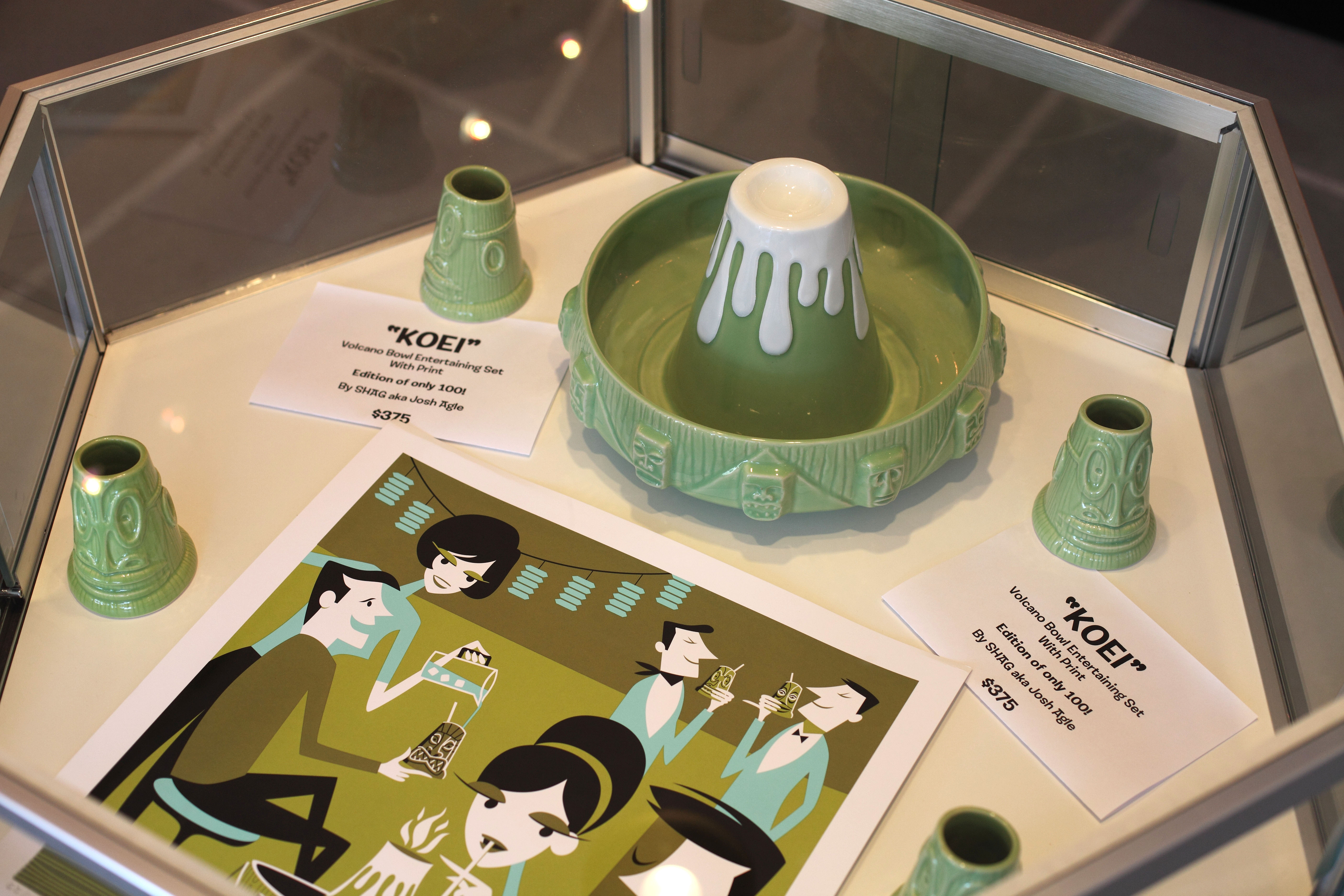 KOEi Volcano Bowl used for a signature "tiki" drink